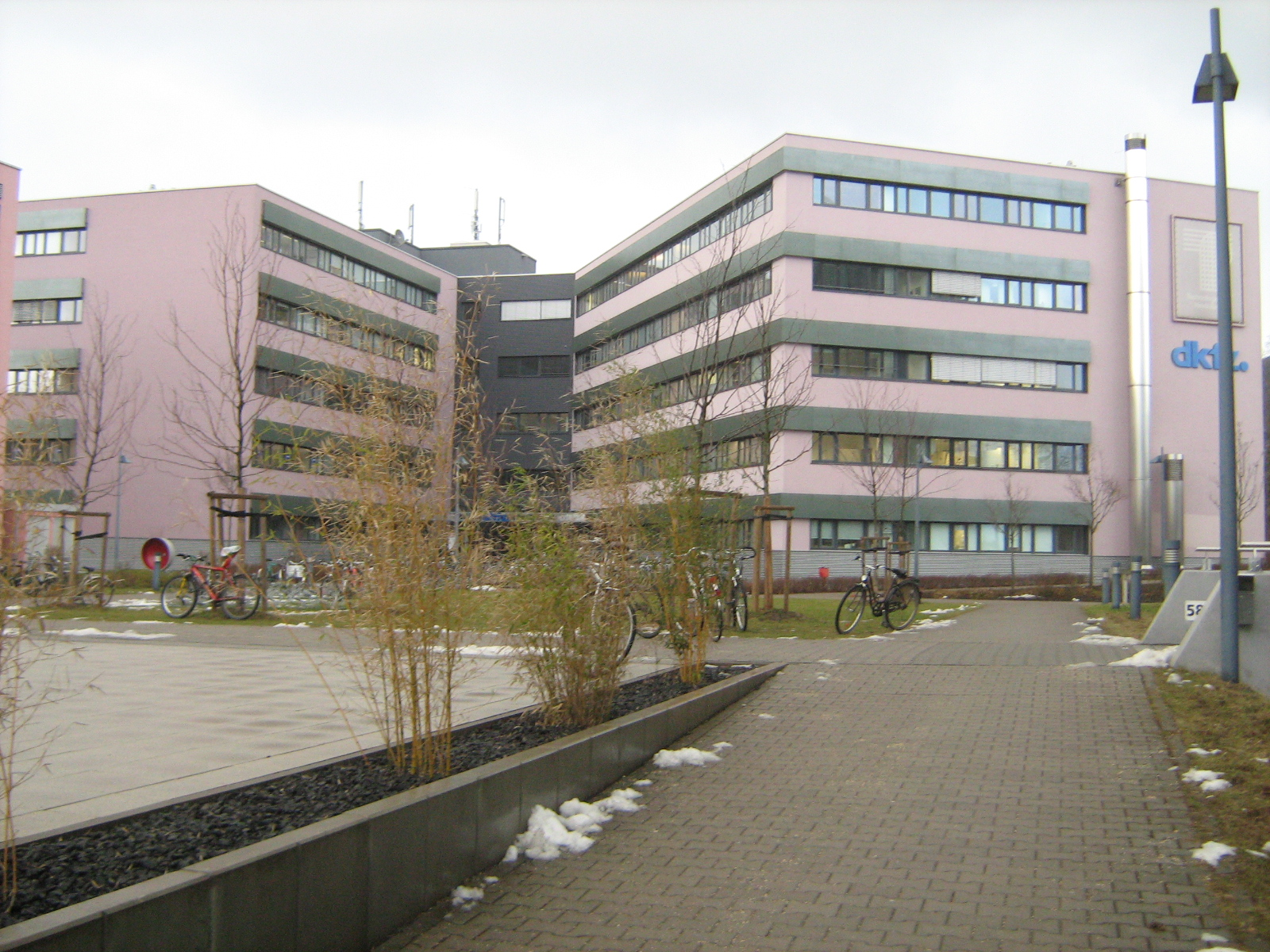 Hauptgebäudes des Technologiepark Heidelberg